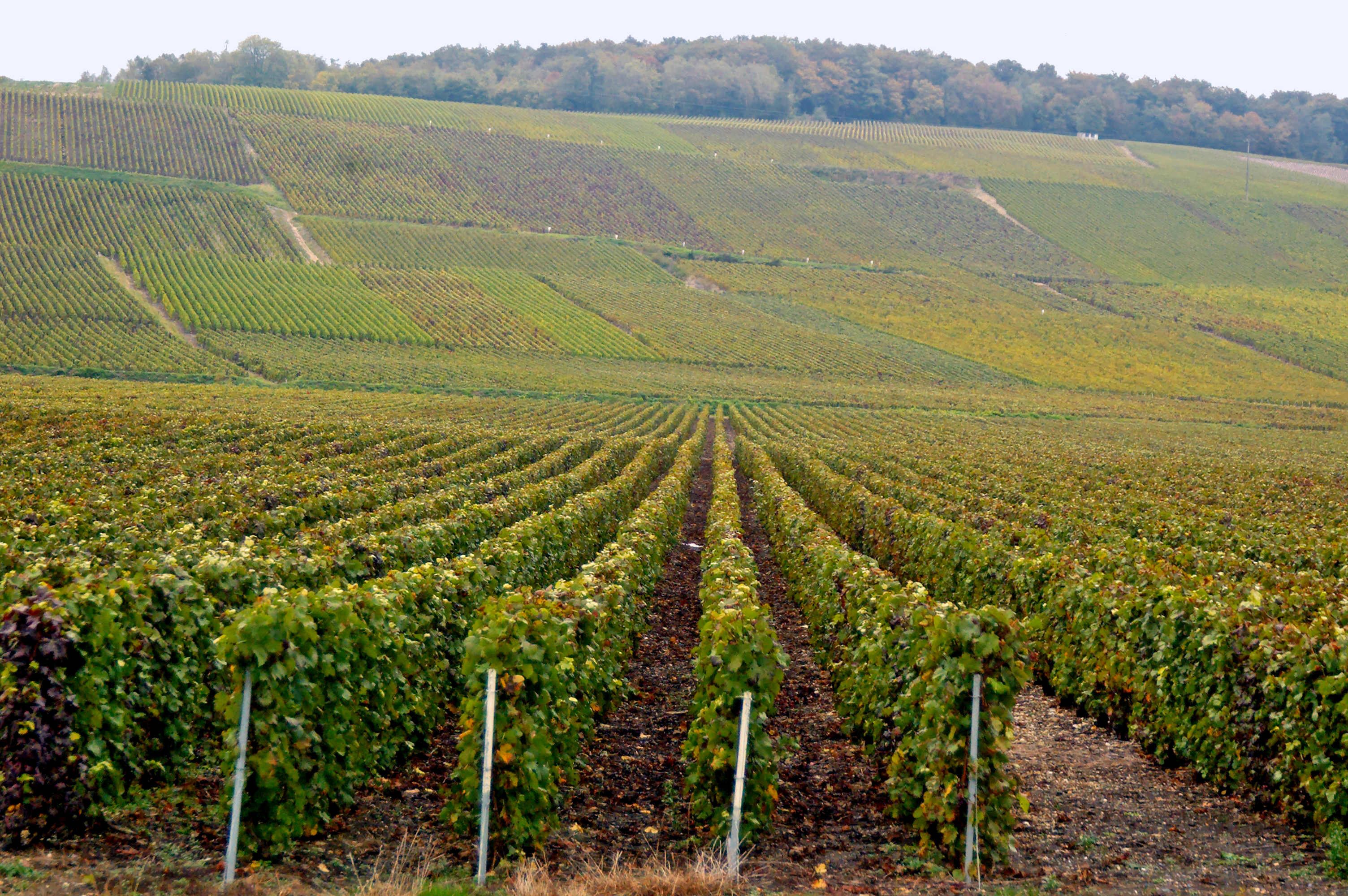 Passy-sur-Marne au cœur du vignoble de Champagne